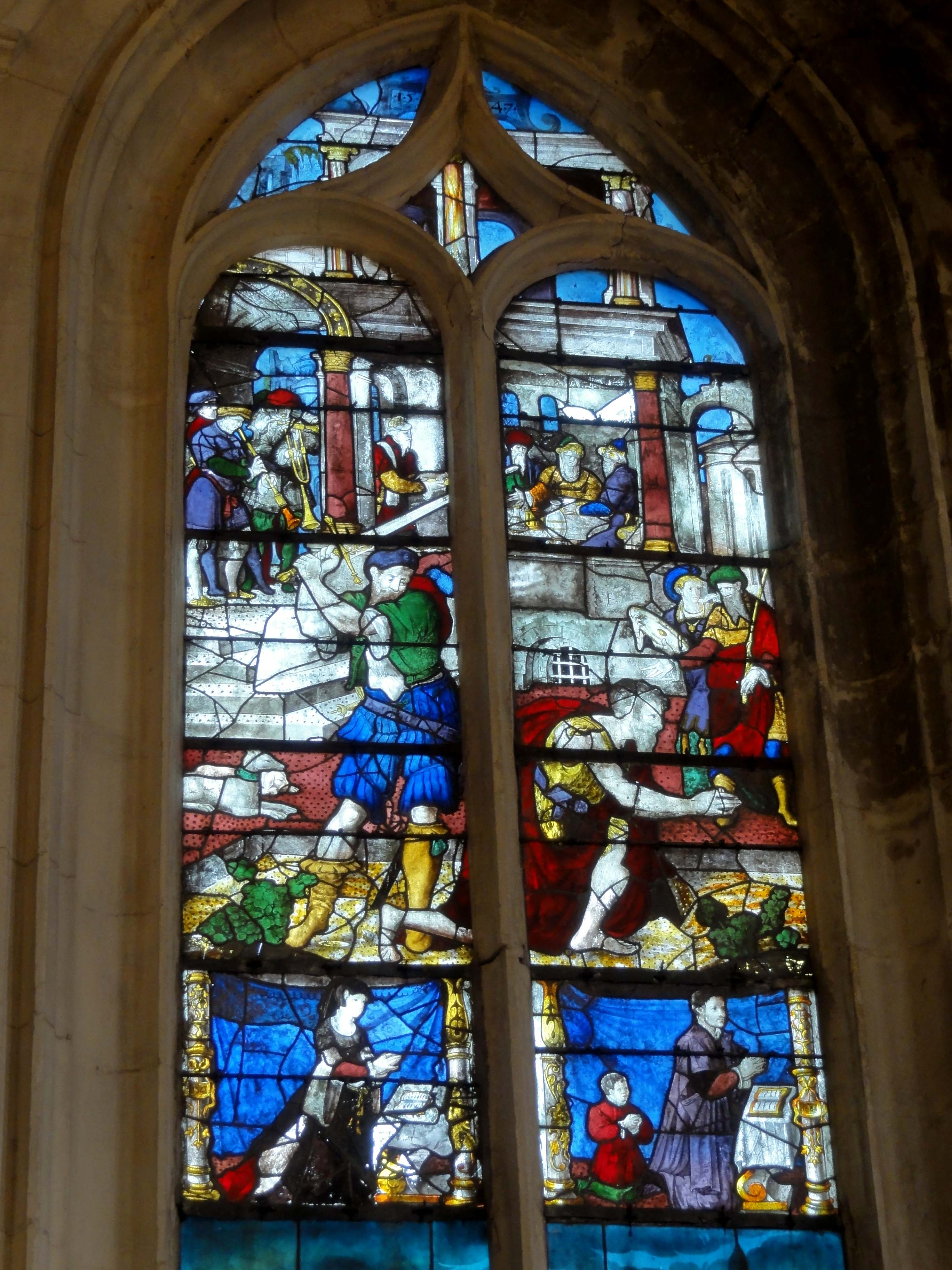 Verrière n° 3 (travée nord-est du déambulatoire) - décollation de St Jean-Baptiste.